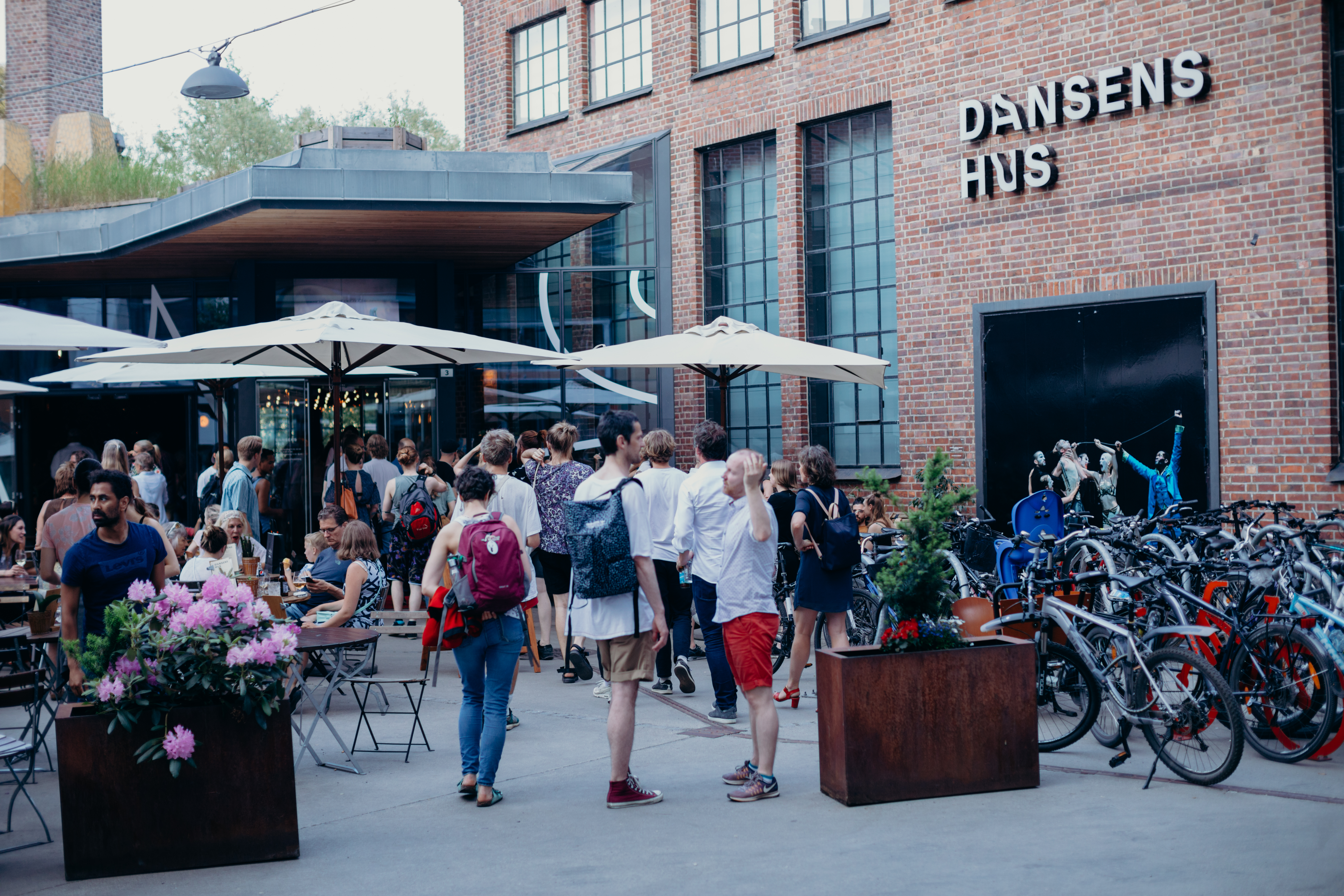 Dansens Hus Sommer Premiere